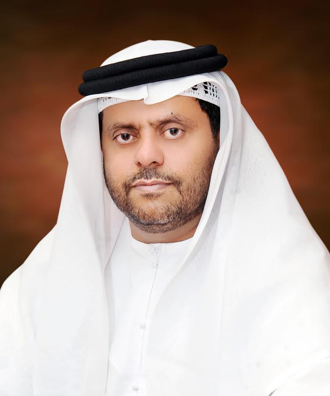 سعادة محمد ثاني مرشد الرميثي رئيس غرفة تجارة وصناعة أبوظبي